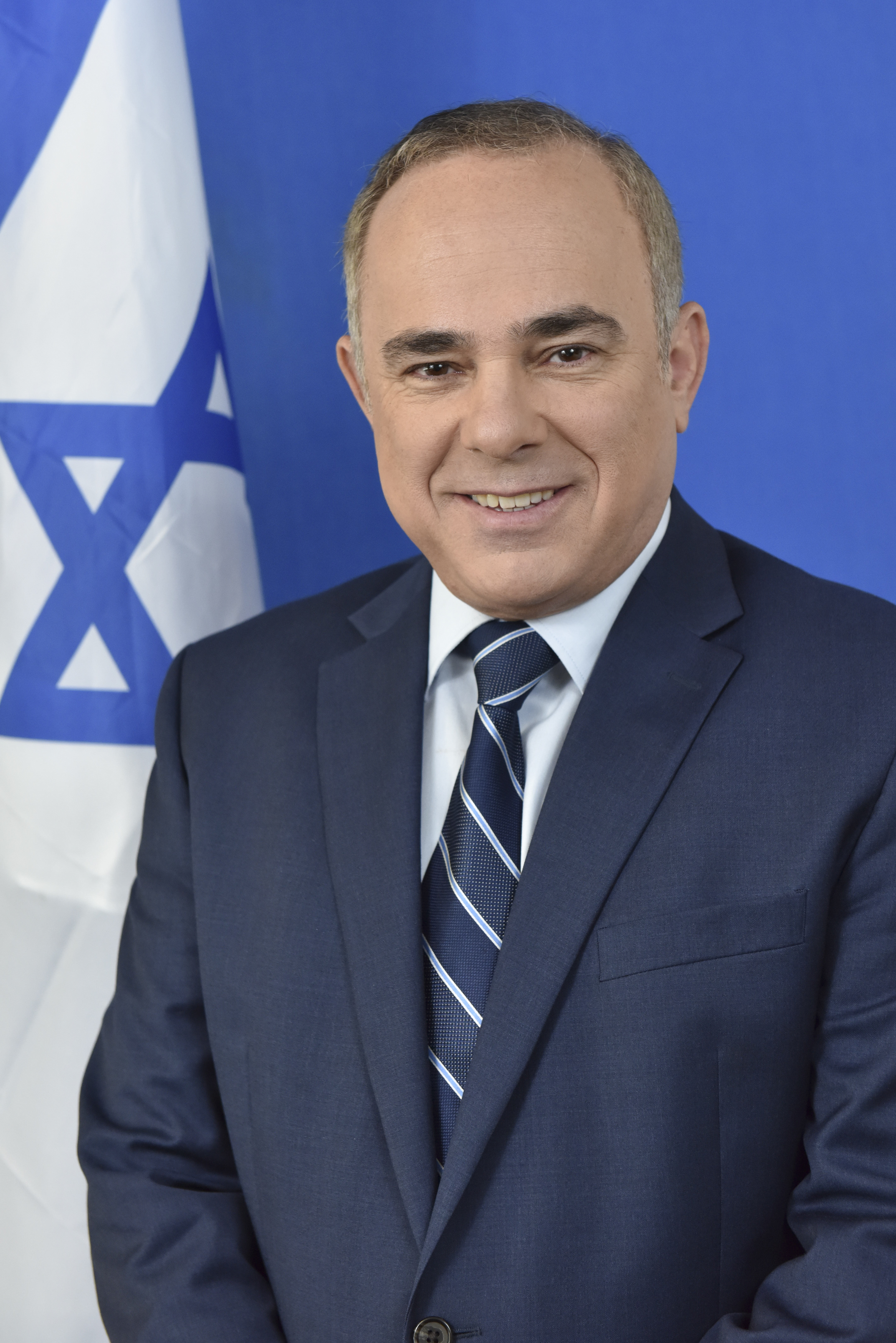 יובל שטיינמיץ